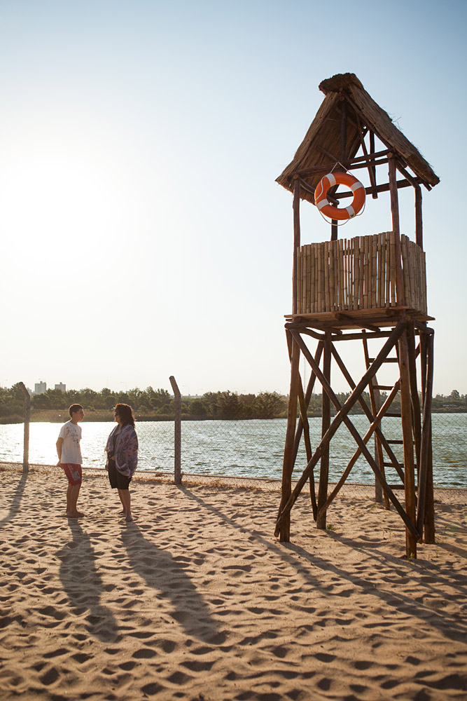 Fotos: Estrella Herrera